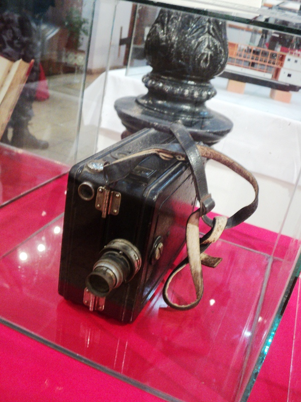 Camara usada por Antonio Wong Rengifo expuesta en el museo temporal Iquitos de antaño en enero de 2013.